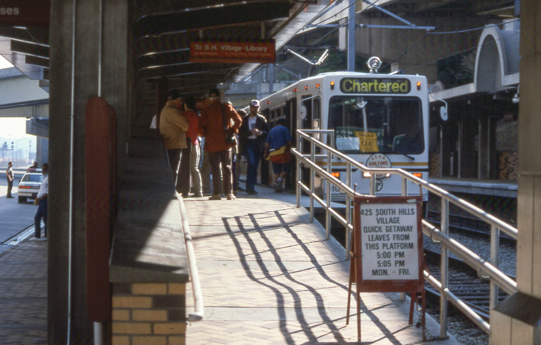 19940529 01 PAT LRT, Penn Station, Pittsburgh